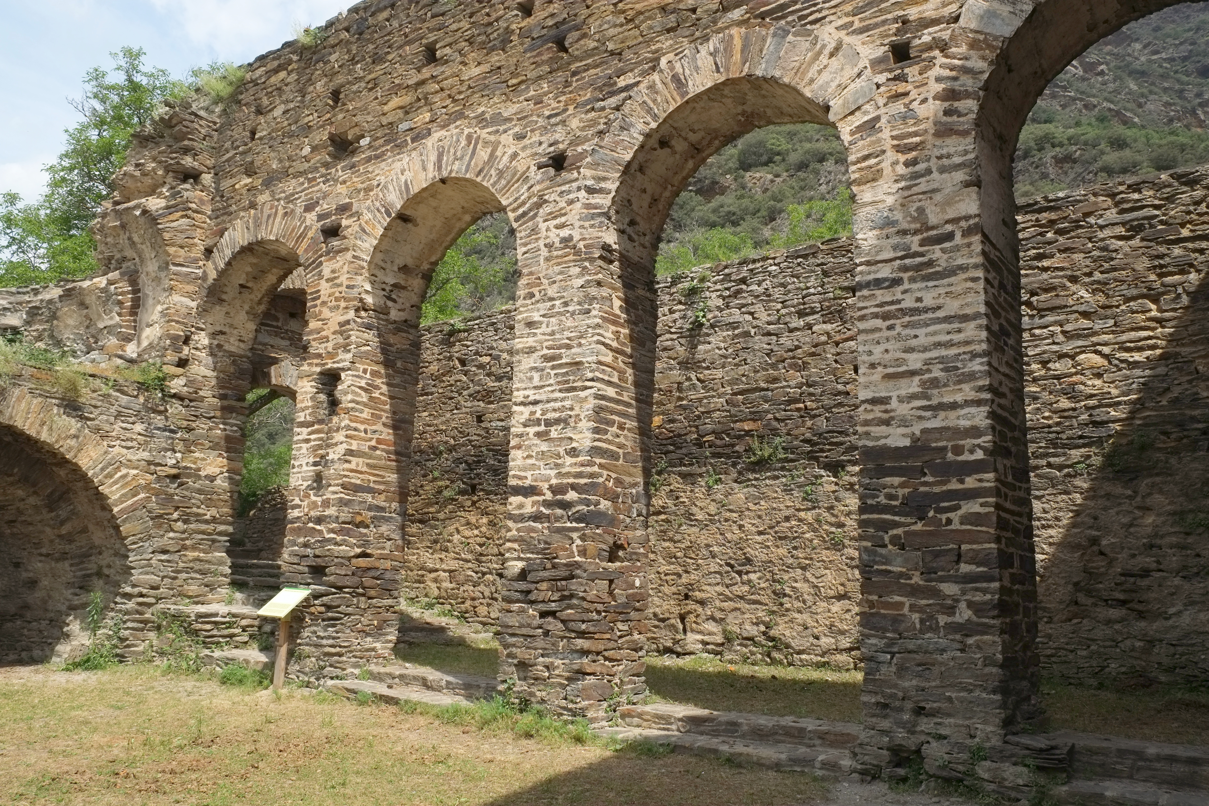 Kloster Sant Pere de Burgal in Escaló in der Provinz Lerida in Katalonien (Spanien)